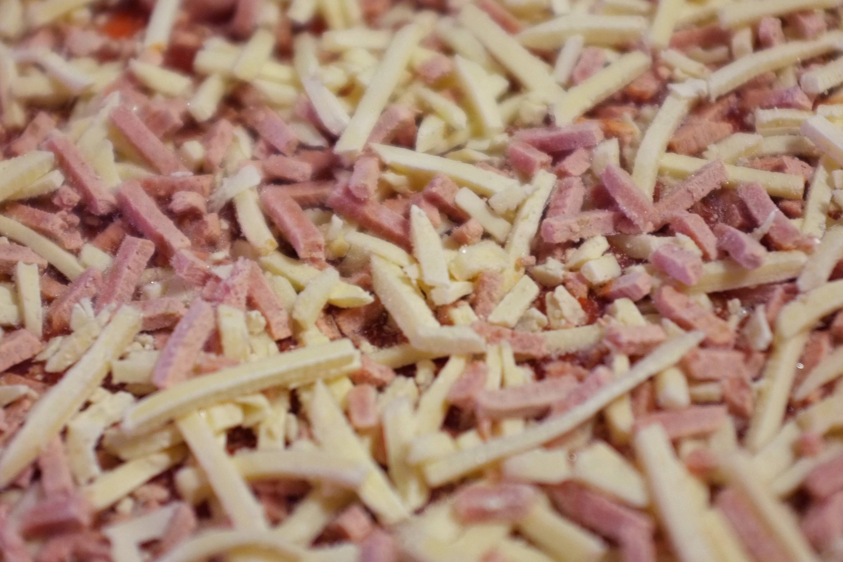 Big One Classic, en norsk frossenpizza. Bildet viser pizzaen i frossen tilstand, før steking.